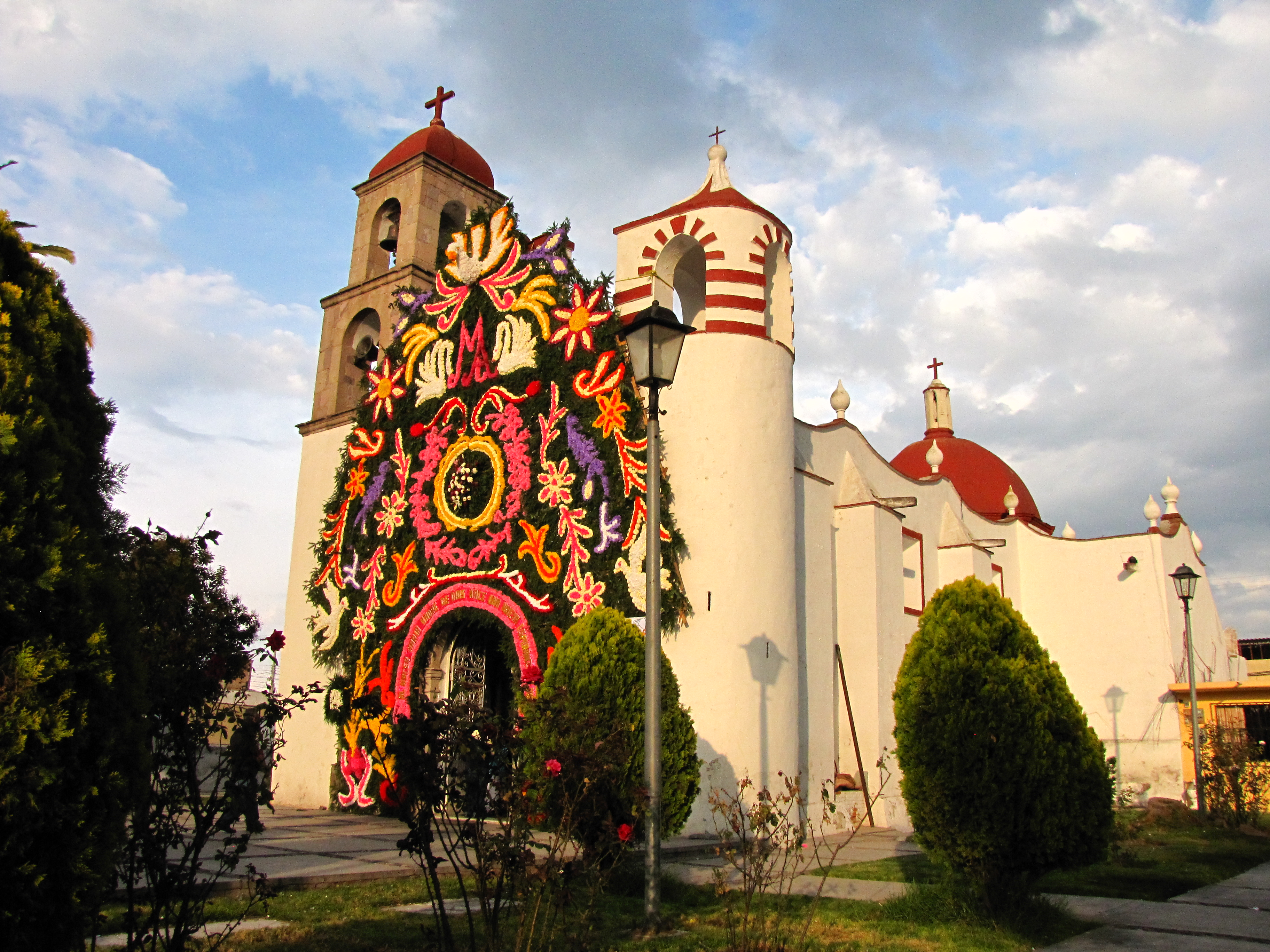 La iglesia de la Inmaculada Concepción decorada con motivo de la celebración del nacimiento de la Virgen María el 8 de Septiembre. Esta fiesta es también referida por los pobladores de la comunidad como "El 8 chiquito" refiriendo que la fiesta del 8 de septiembre es la fiesta "menor" precediendo a la fiesta "mayor" del pueblo el 8 de diciembre de cada año que es la celebracion de la Inmaculada Concepción, patrona de Zapotlán.